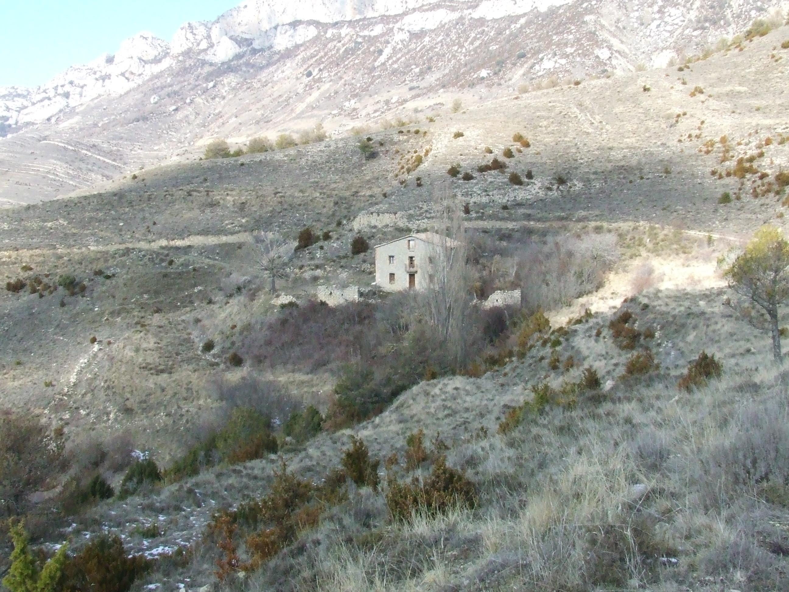 Cal Joquer (la Torre d'Eroles, Abella de la Conca, Pallars Jussà)